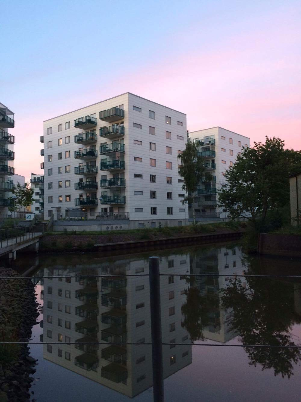 Området Porslinsfabriken